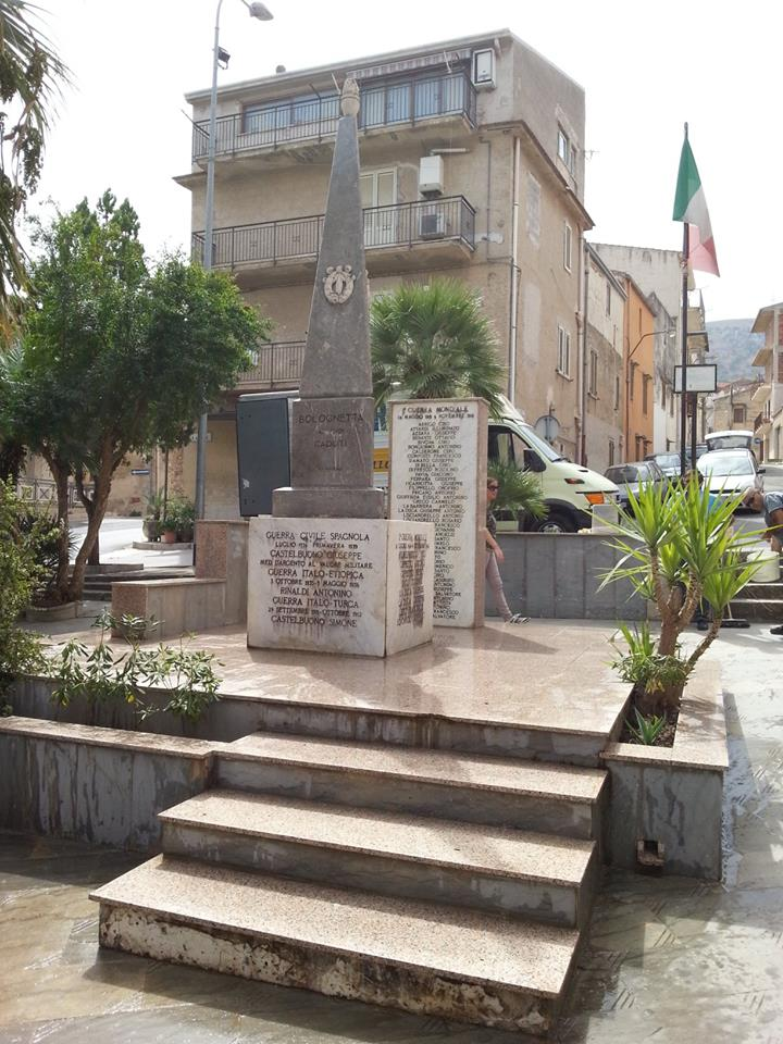 Piazza Giuseppe Castelbuono